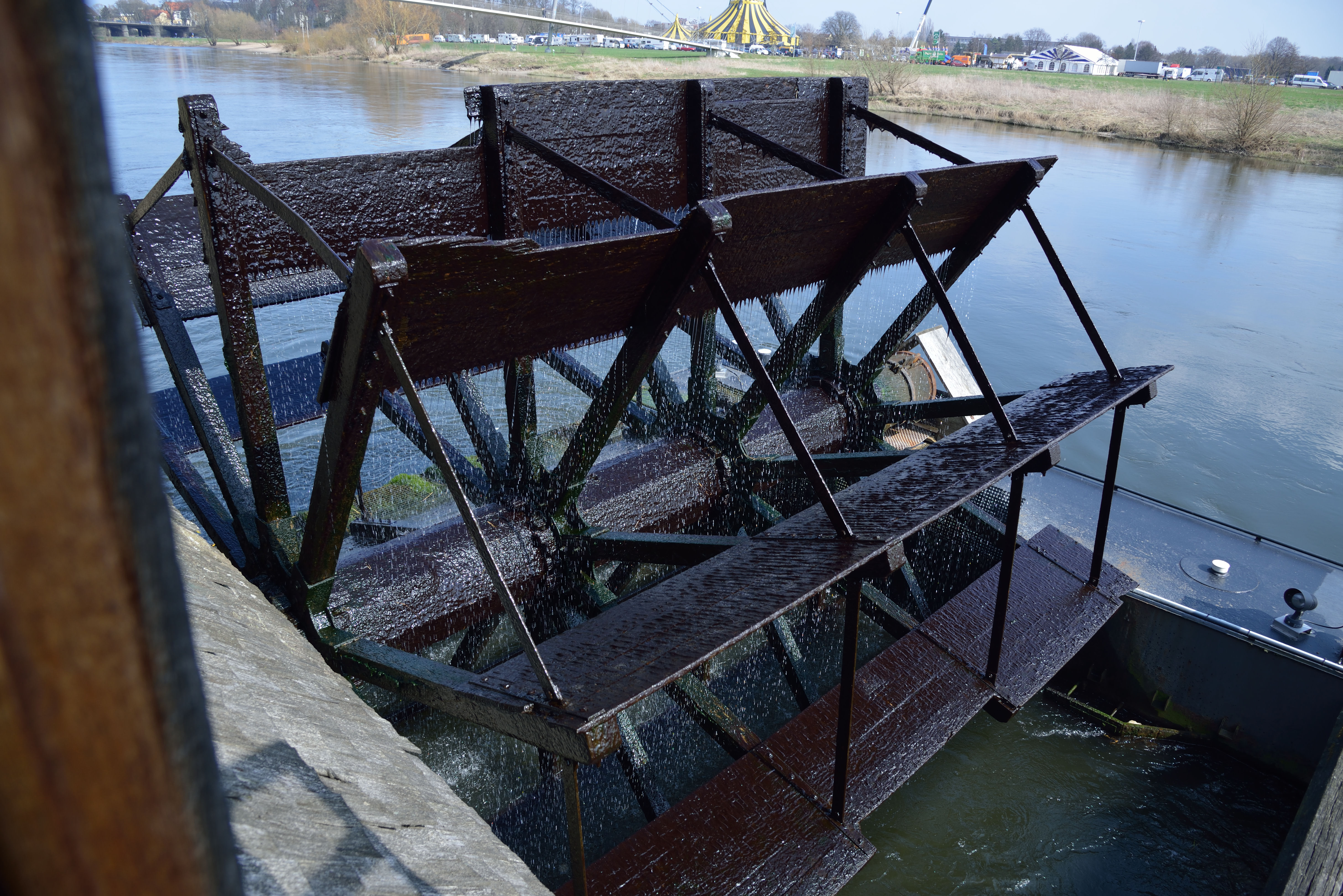 Schipmolen Minden, Duitsland, waterrad